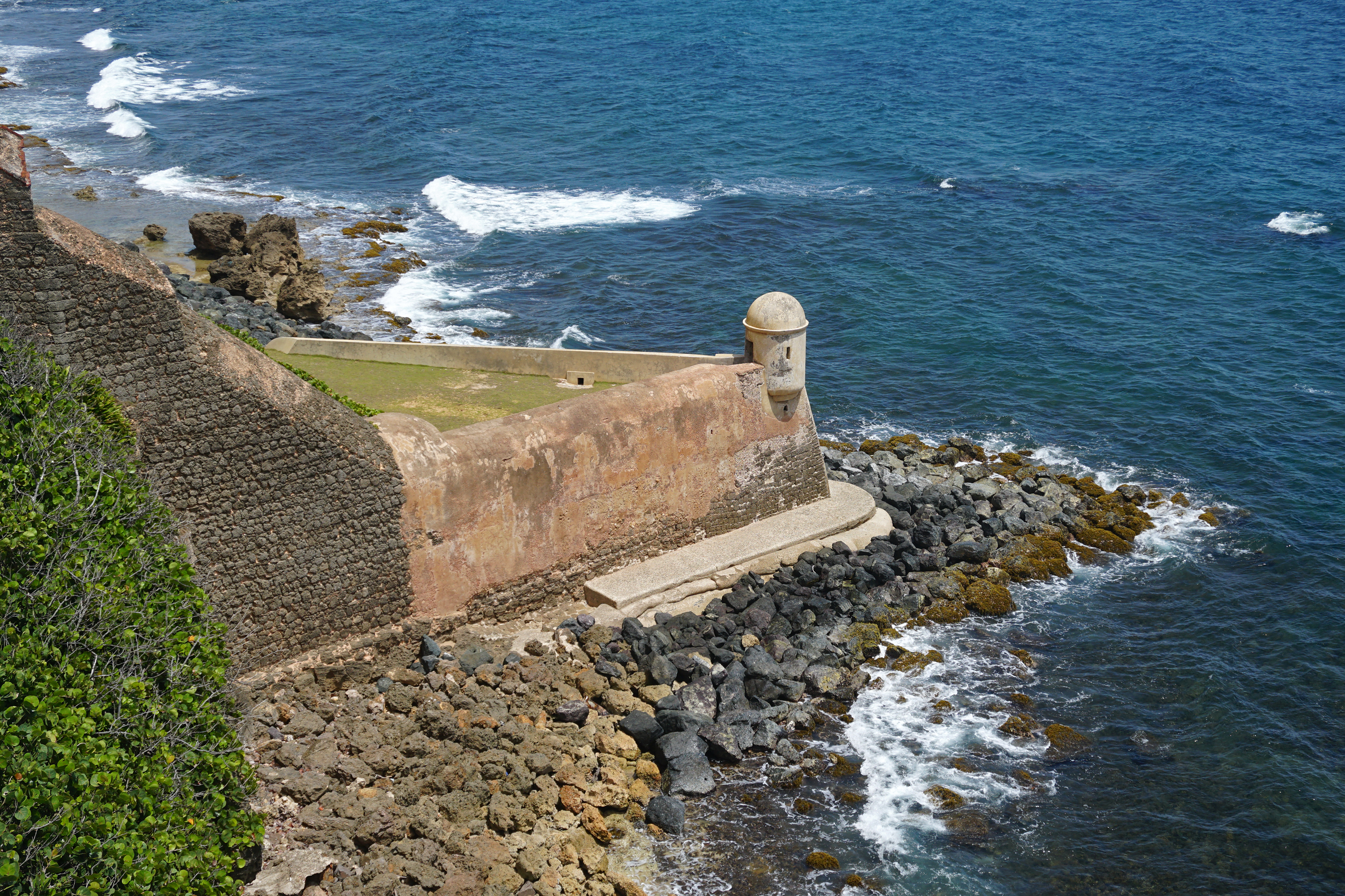 Garita del Diablo, Fortaleza San Cristóbal, Viejo San Juan, Puerto Rico.